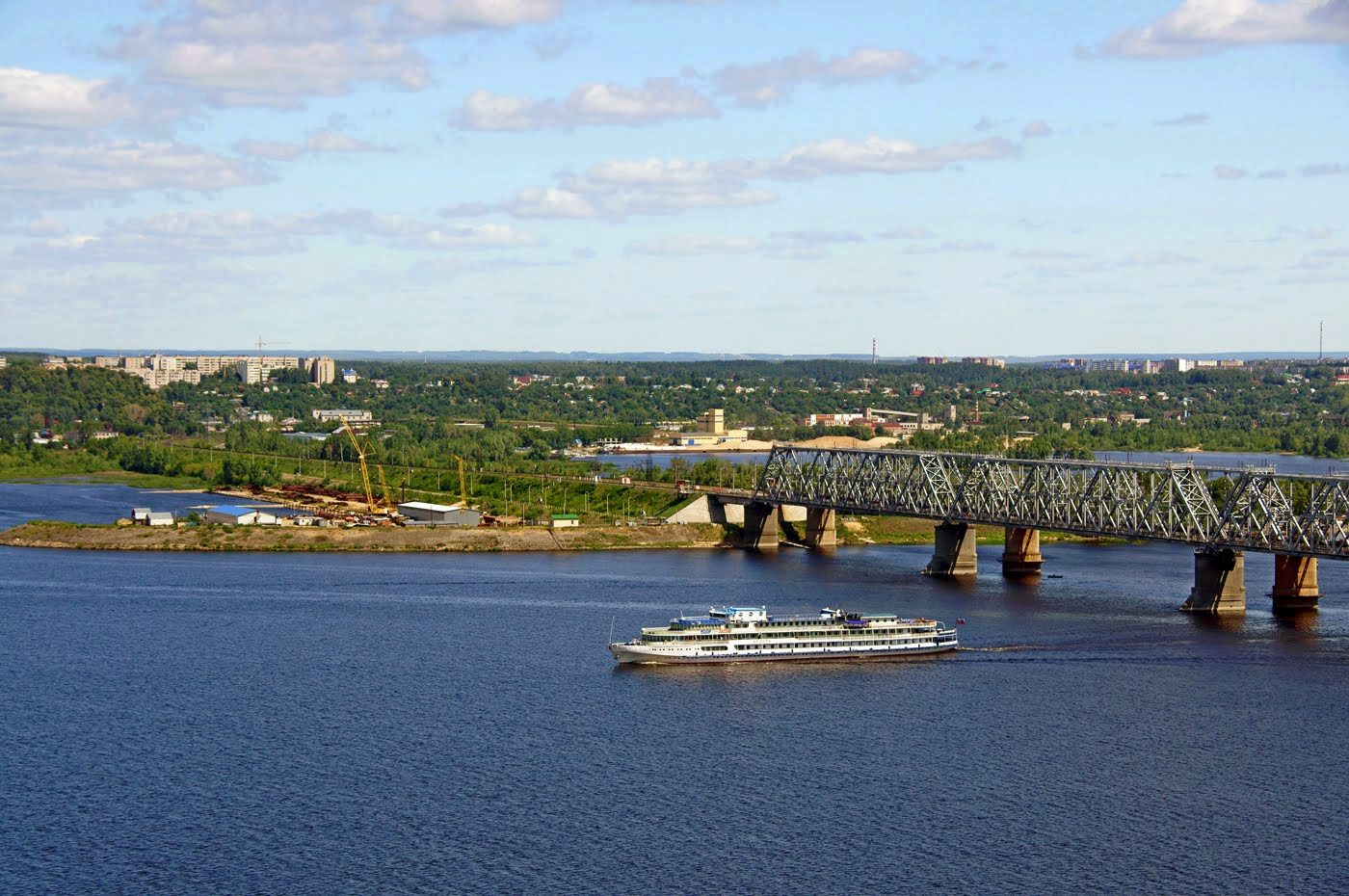 Романовский железнодорожный мост через Волгу: перегон Зеленый Дол-Свияжск, Зеленодольский район, Татарстан